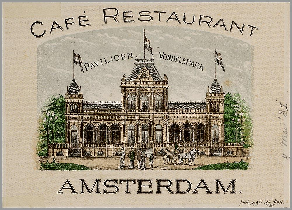 Reclamekaart: Café Restaurant Paviljoen Vondelspark Joh. M. van Kuiken (Amsterdam). Drukker: Faddegon & Co.